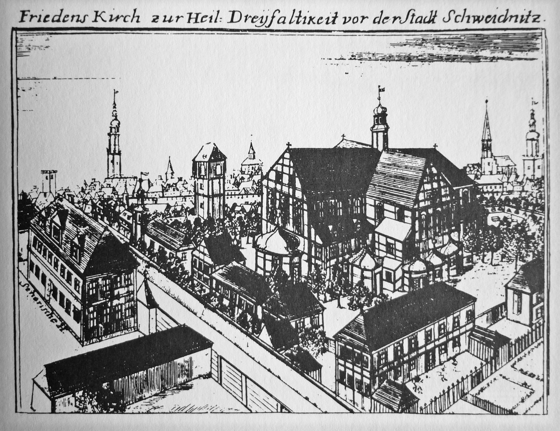 Friedenskirche in Schweidnitz (Schlesien) aus Friedrich Bernhard Werner: Schlesische Bethäuser (1748-52)